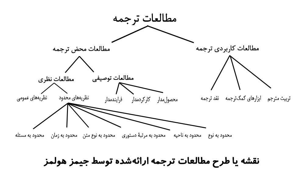 نقشه یا طرح مطالعات ترجمه ارائه‌شده توسط جیمز هولمز